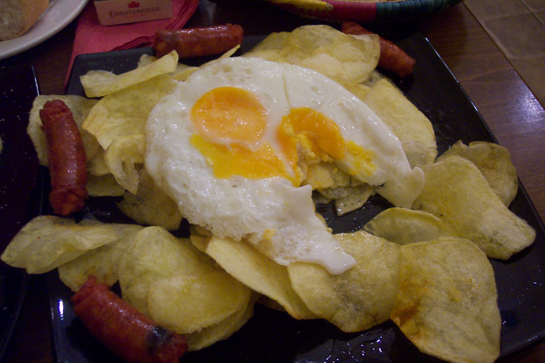 Huevos estrellados